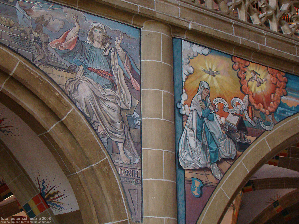 Verkündigung, Detail von der Empore, Stadtkirche Bad Wimpfen Dieses Fresko wurde leider so stark übermalt, daß es Heinrich Vogtherr dem Älteren, dem Maler des "Jüngsten Gerichts" (an der östlichen Giebelwand des nördlichen Seitenschiffes) nicht sicher zugeschrieben werden kann.[1]